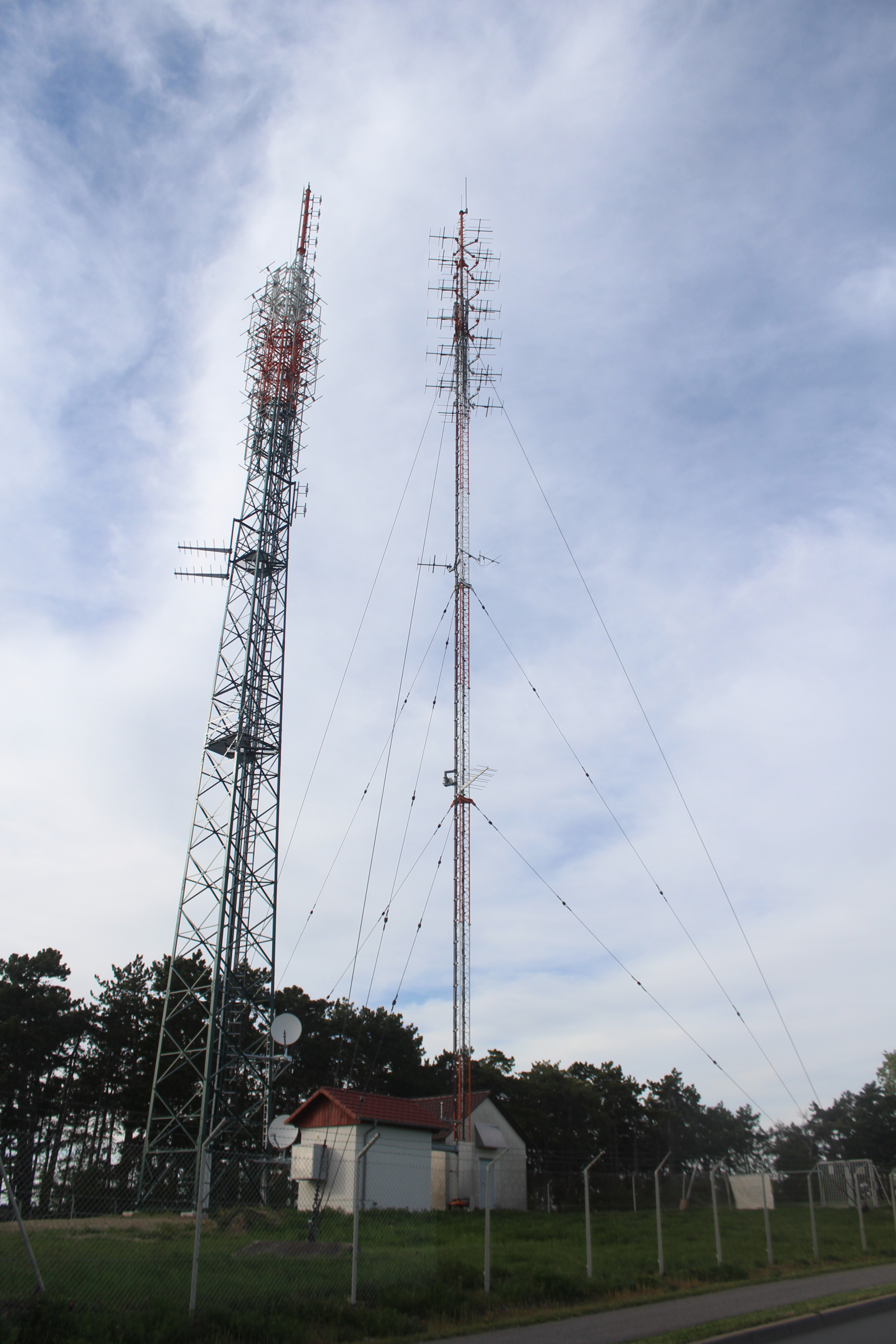 Sender Buchen - links der neue Sendeturm, rechts der alte Sendemast